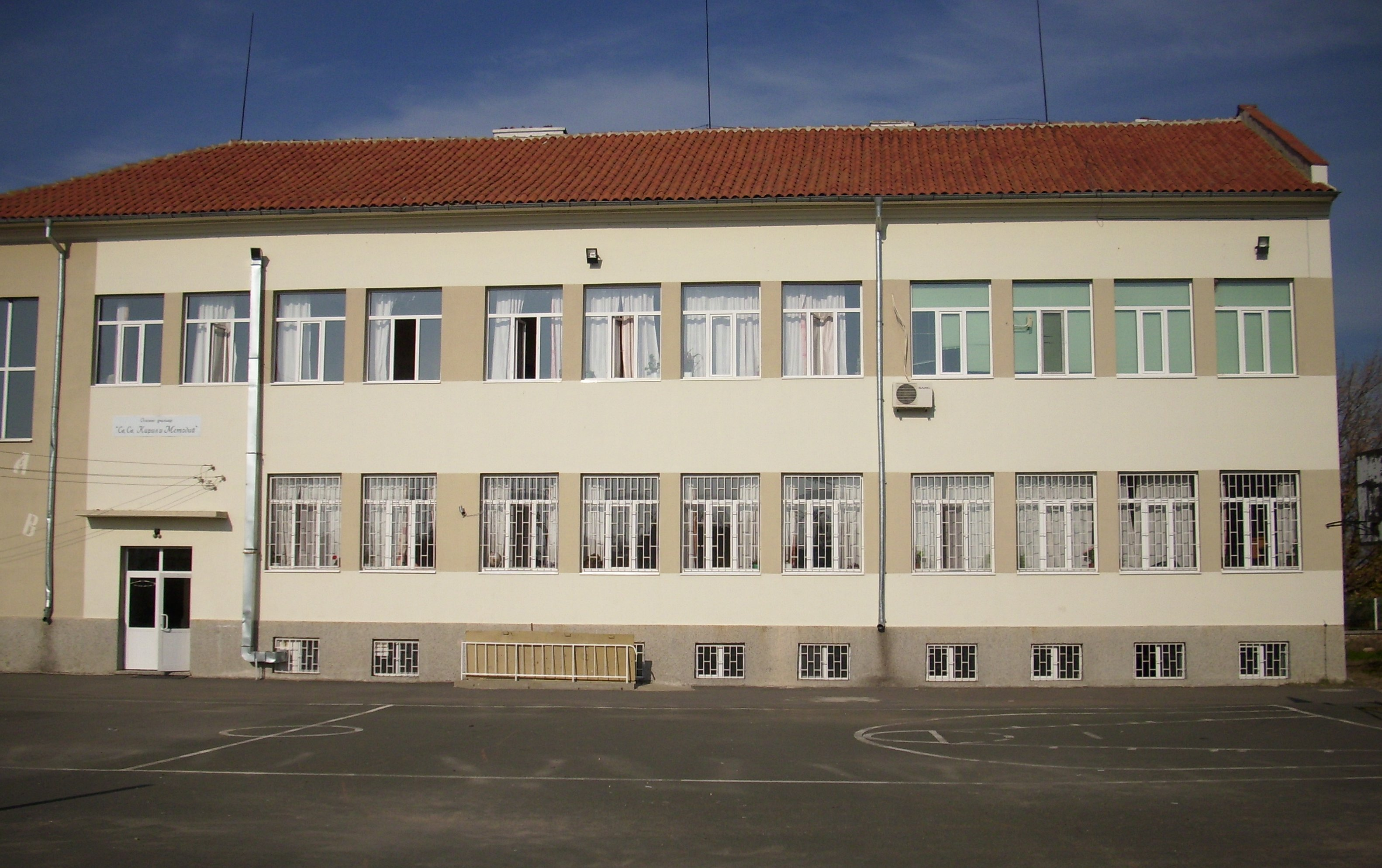 ОУ "Св. Св. Кирил и Методий"